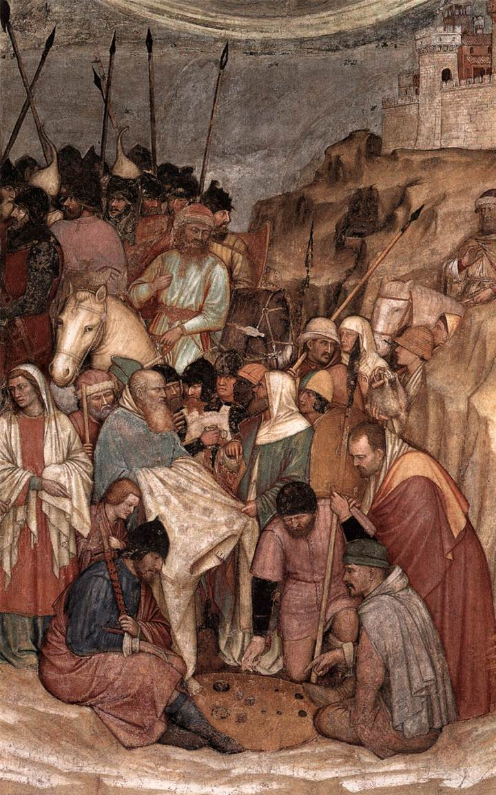 (detail) right